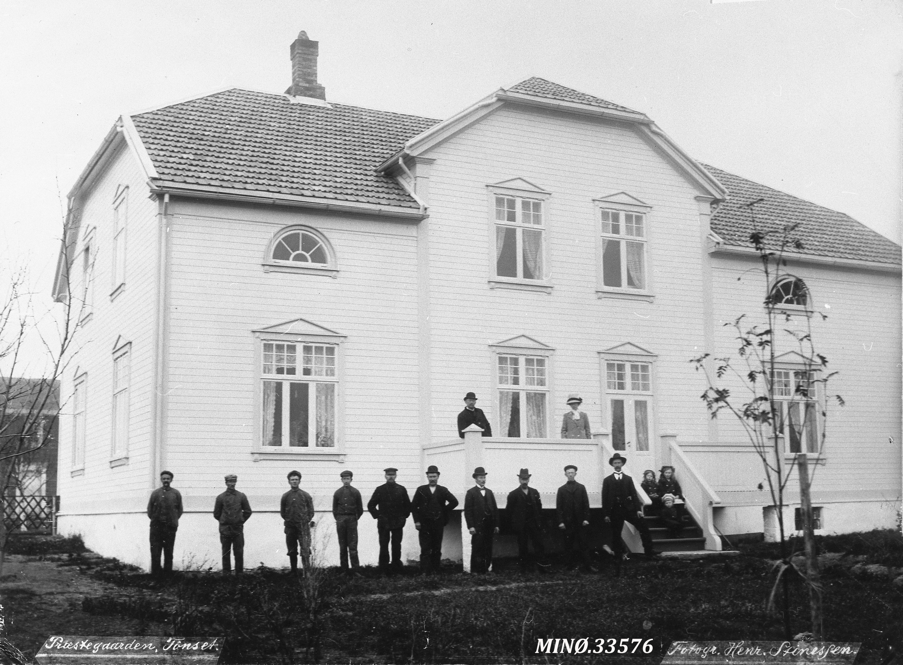 Tynset prestegård